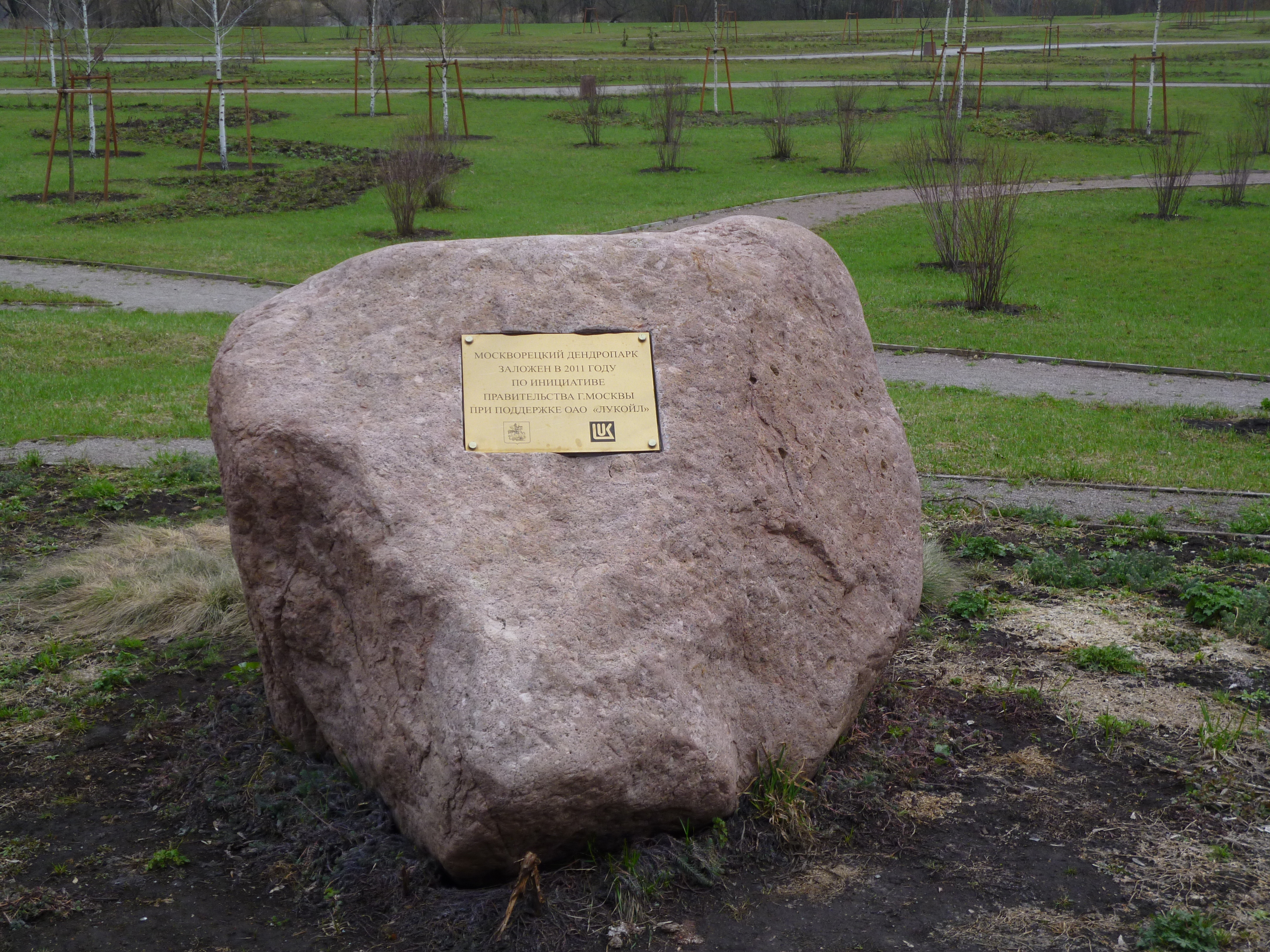 Москворецкий дендропарк